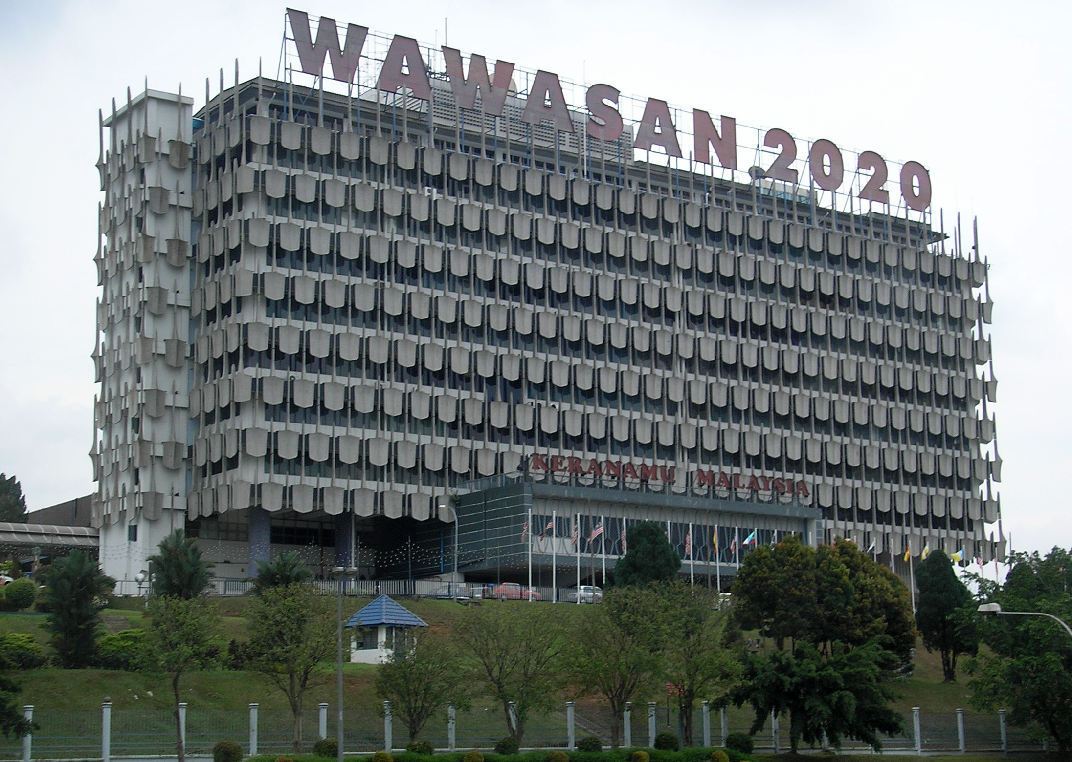 The Angkasapuri building, Kuala Lumpur, Malaysia.